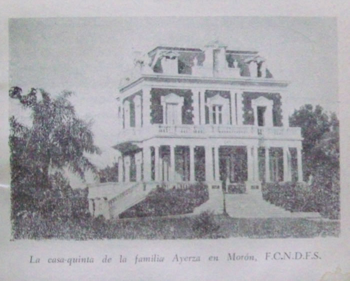 Residencia Ayerza, hoy el colegio del Instituto Inmaculada. Castelar, Prov. de Buenos Aires, Argentina.